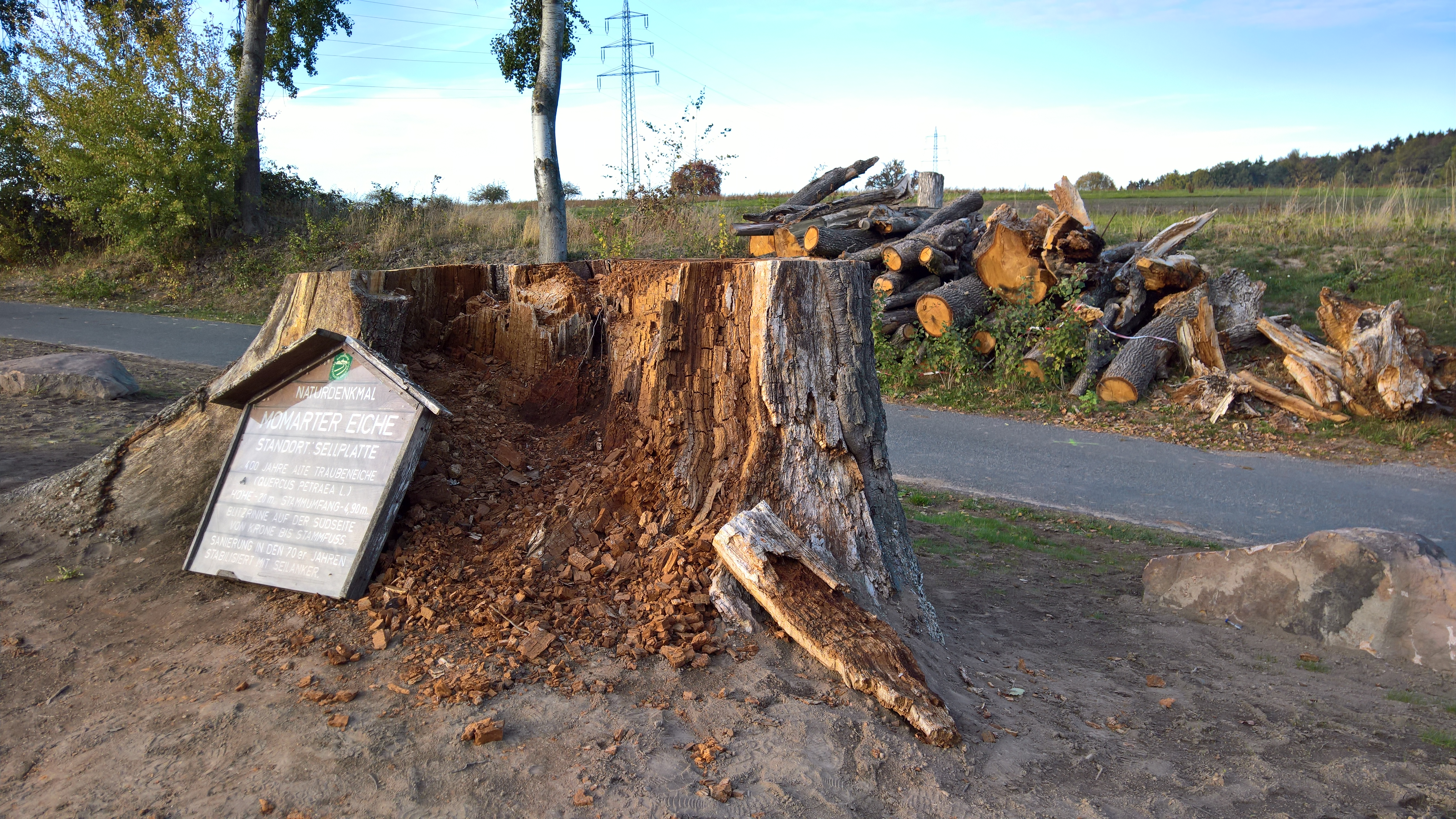 Die Überreste der Momarter Eiche im November 2018, Stammrest und zurechtgeschnittene Äste